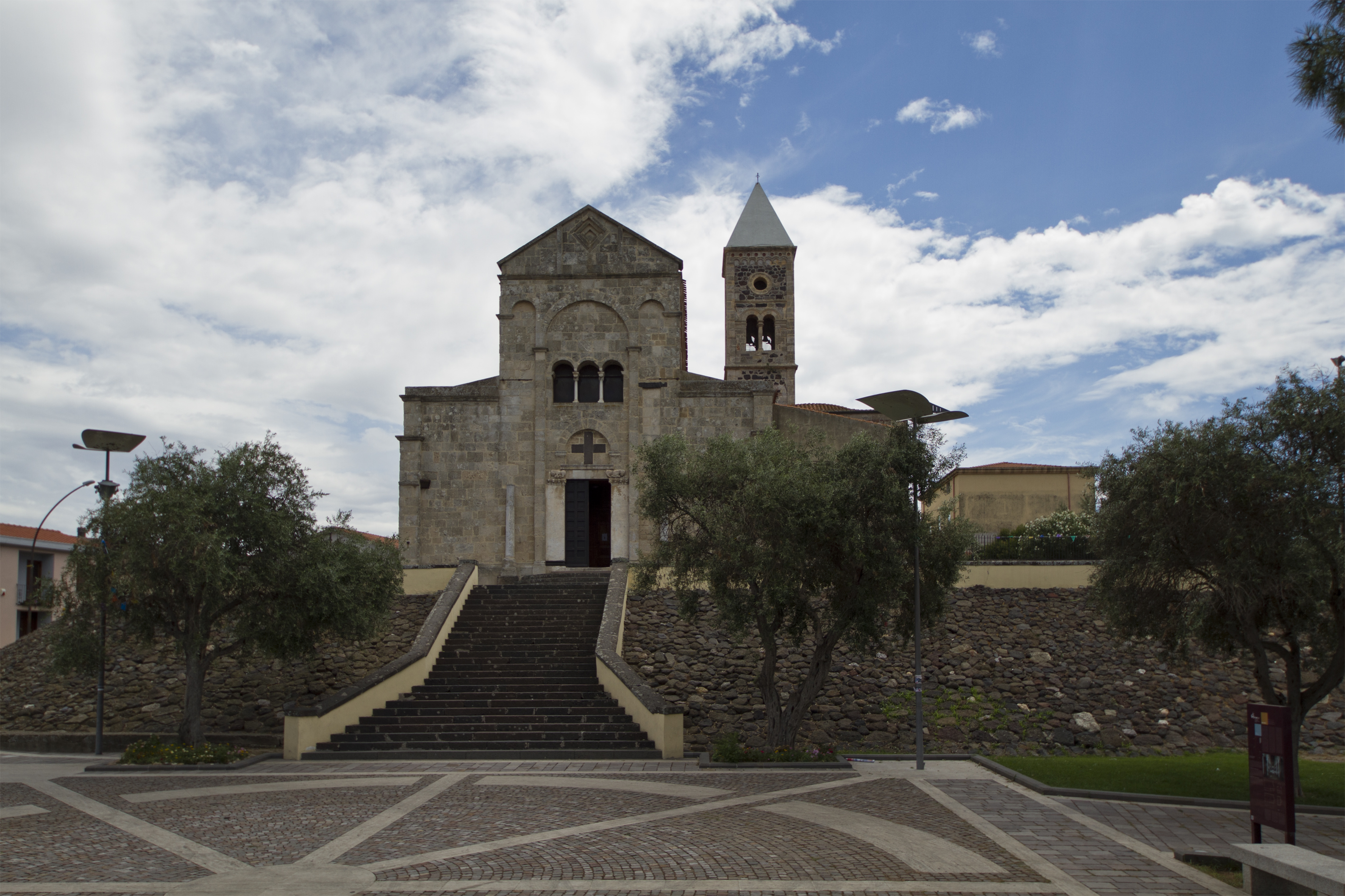 La chiesa di Santa Giusta, Santa Giusta OR, Sardinia, Italy